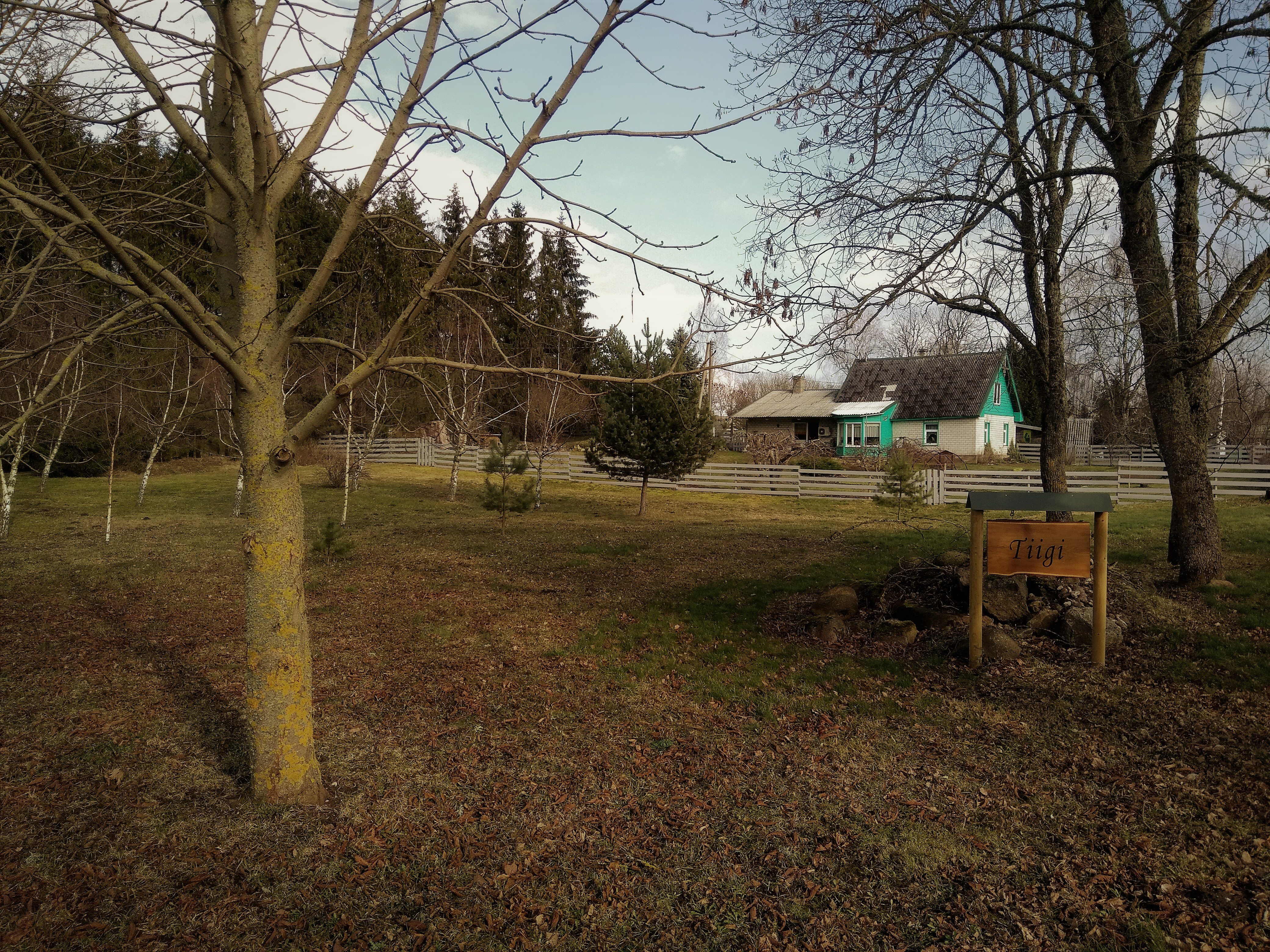 Vaade edelast linnusealale. Kusagil esiplaanil paiknes lääne- ja lõunapoolse vallikraavi ühendusnurk.